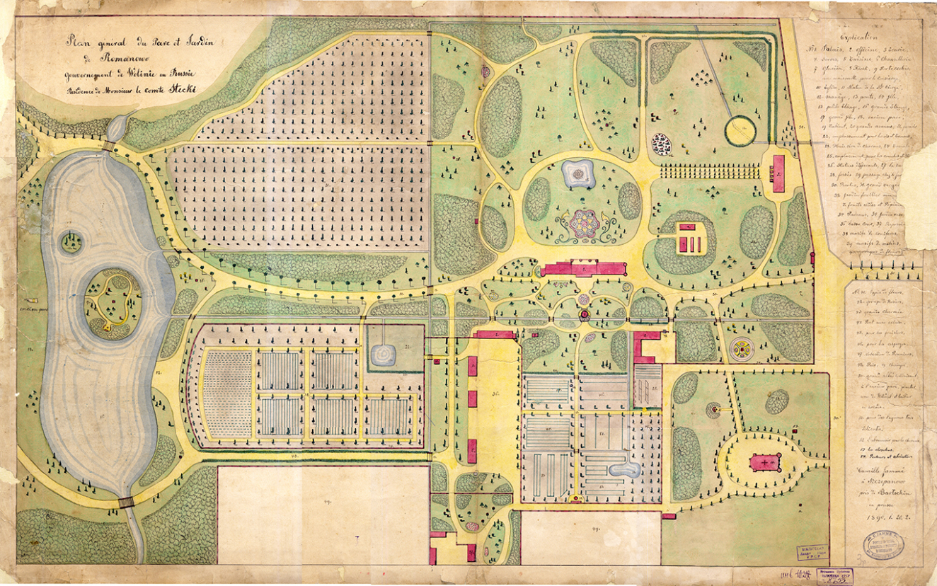 Маєток французькою